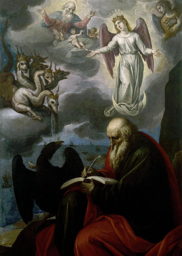 La obra representa al anciano apóstol San Juan Evangelista.